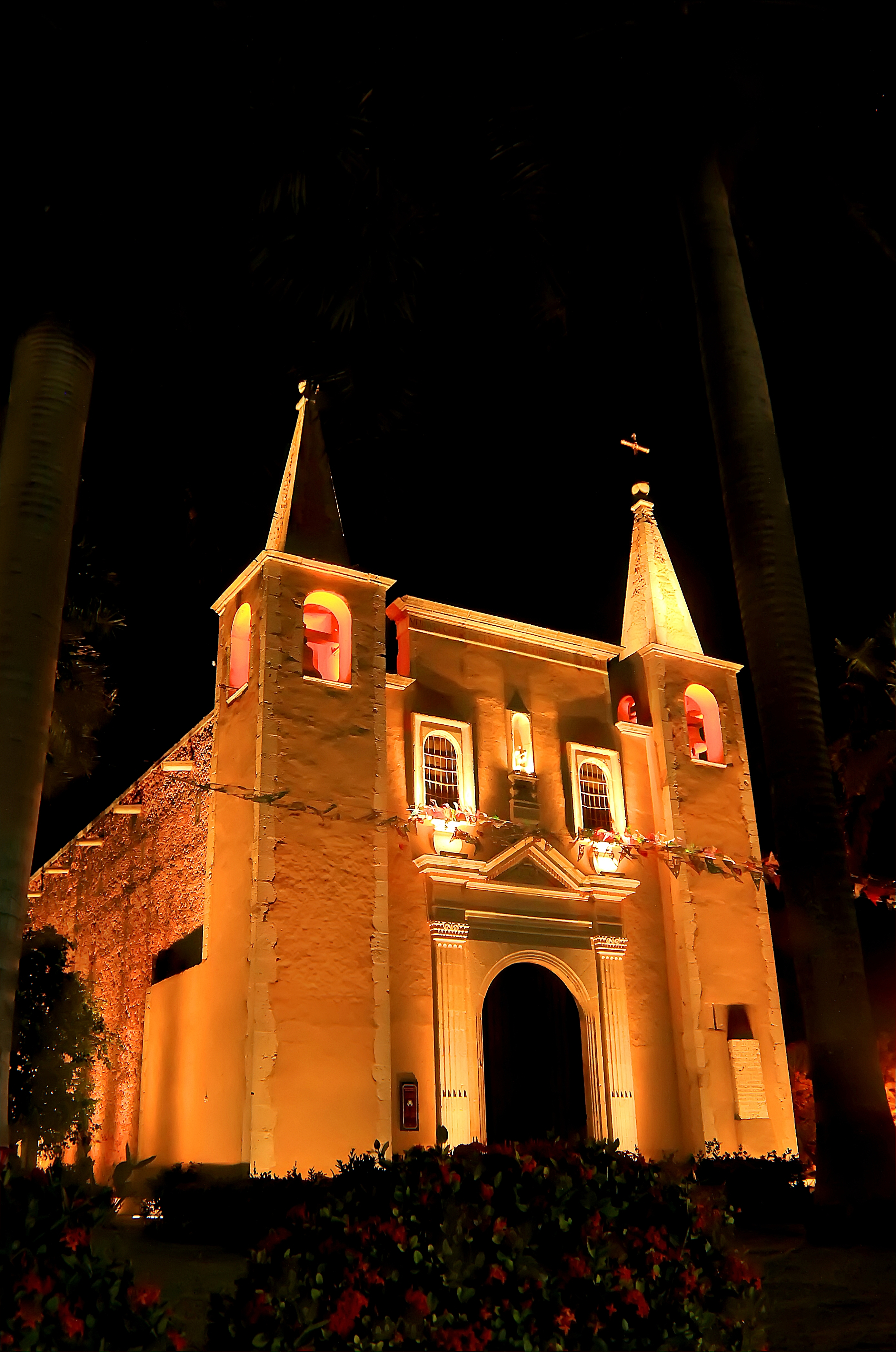 Vista lateral del Templo de Santa Ana en Mérida,Yucatán, México.